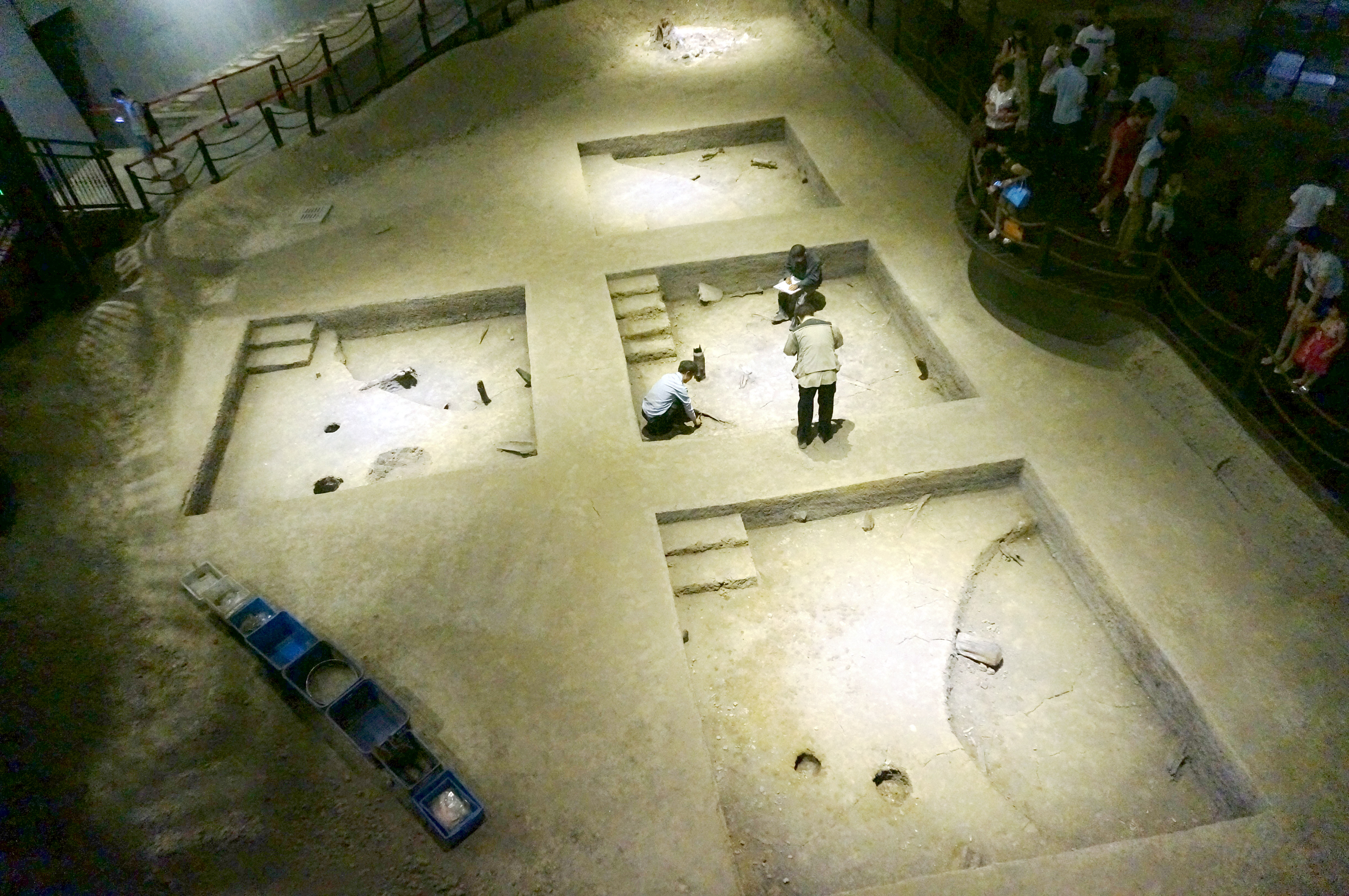 跨湖桥遗址博物馆，遗址厅内的遗址。